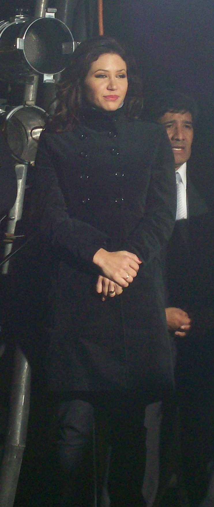 Adabel Guerrero, actriz y vedette argentina